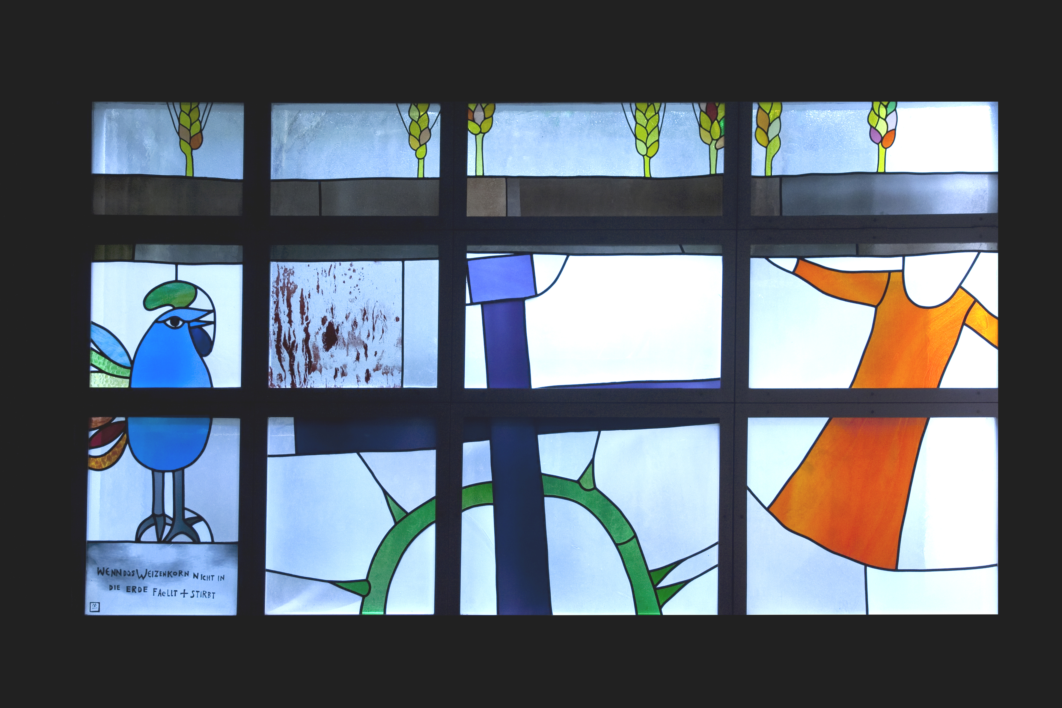 Glasfenster von Max Rüedi in der Krypta der Römisch-katholischen Kirche Allerheilgen Zürich